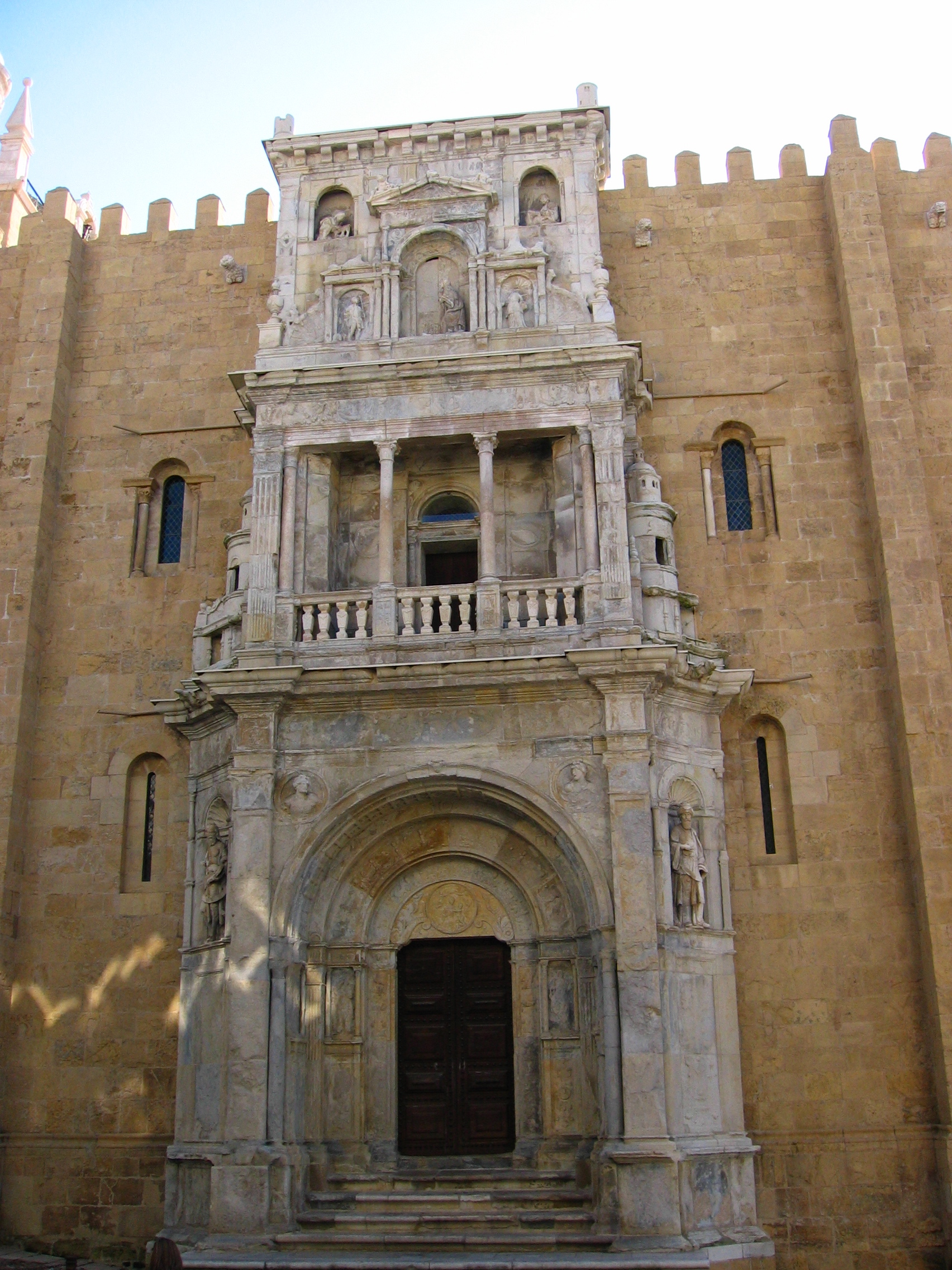 Porta Especiosa of Old Cathedral of Coimbra (Sé)